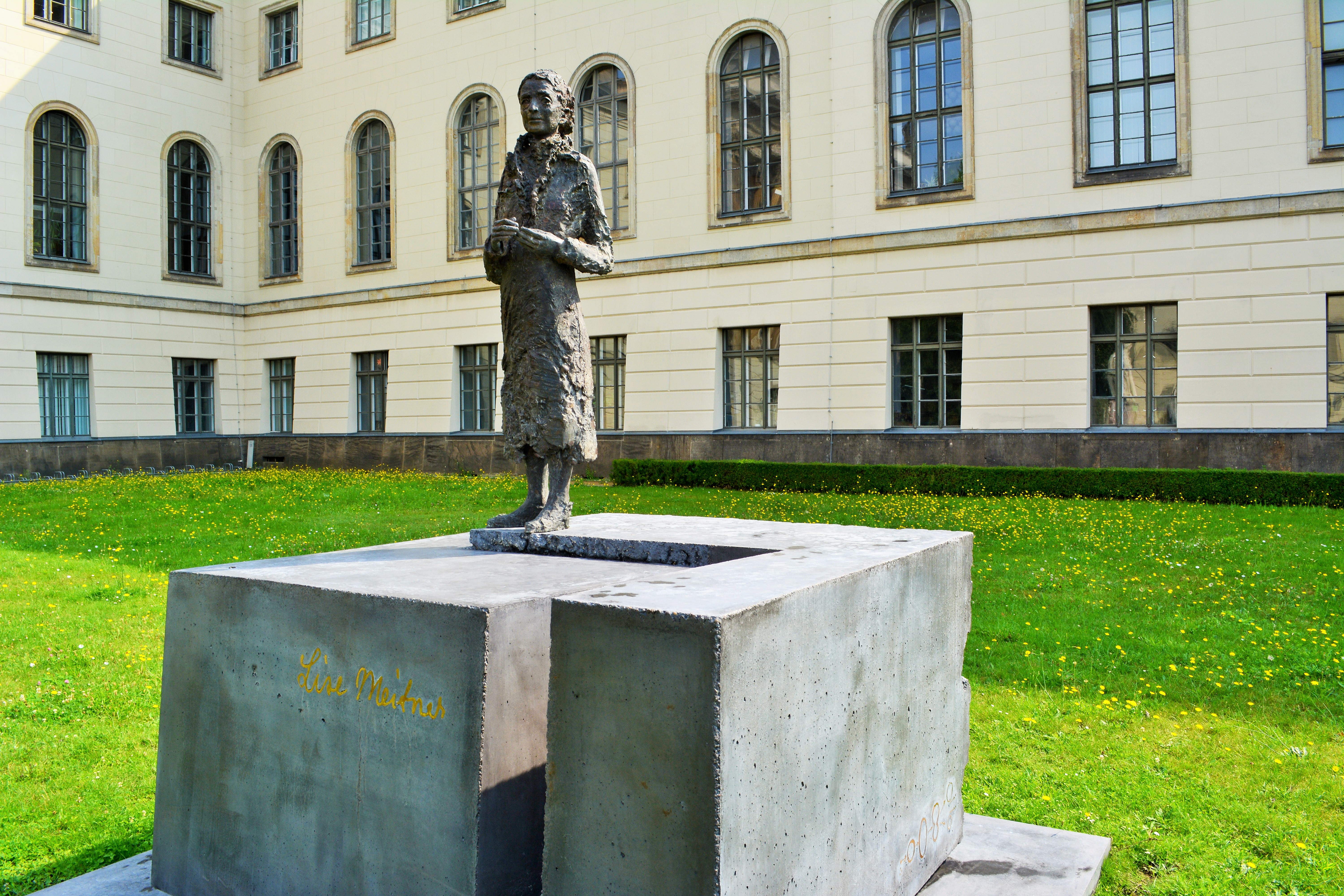 Denkmal für die deutsche Kernphysikerin Lise Meitner (1878-1968) im Ehrenhof der Humboldt-Universität Berlin Unter den Linden, geschaffen von der Bildhauerin Anna Franziska Schwarzbach 2014